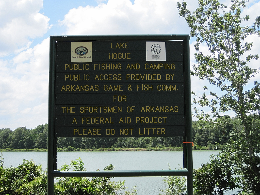 Lake Hogue, Poinsett County, Arkansas